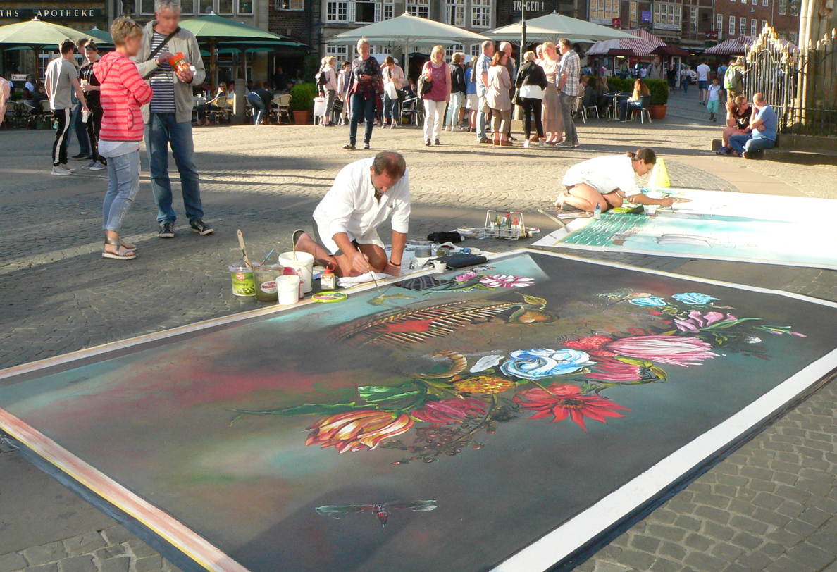 Bremer Marktplatz in Bremen, Deutschland. Hier: Gemeinsame Streetart-Kunstaktion im Rahmen aktueller Ausstellungen in der Kunsthalle Bremen wie folgt:a) vorne: Reproduktion des Werks Blumenkorb (1631) von Ambrosius Bosschaert dem Jüngeren als „Pflastermalerei“ (eigentlich auf Leinwand) durch den Künstler Gregor Wosik aus Mönchengladbach, Nordrhein-Westfalen. Im Rahmen der Ausstellung Tulpen, Tabak, Heringsfang. Niederländische Malerei des Goldenen Zeitalters vom 7. April bis zum 26. August 2018.b) hinten: Reproduktion des Werks Seestück (1767) von Hendrik Kobell als „Pflastermalerei“ (eigentlich auf Leinwand) durch die Künstlerin Feliss Moss aus Straelen, Nordrhein-Westfalen. Im Rahmen der Ausstellung Kühles Licht und weite See. Niederländische Meisterzeichnungen und ihre Restaurierung vom 7. März bis zum 1. Juli 2018.